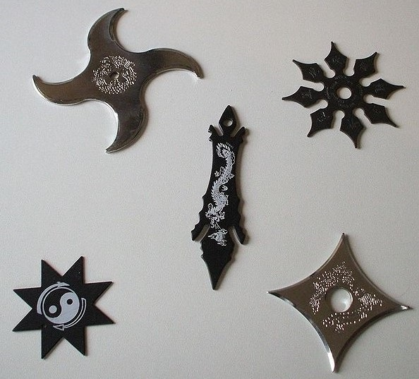 étoile ninja = shaken